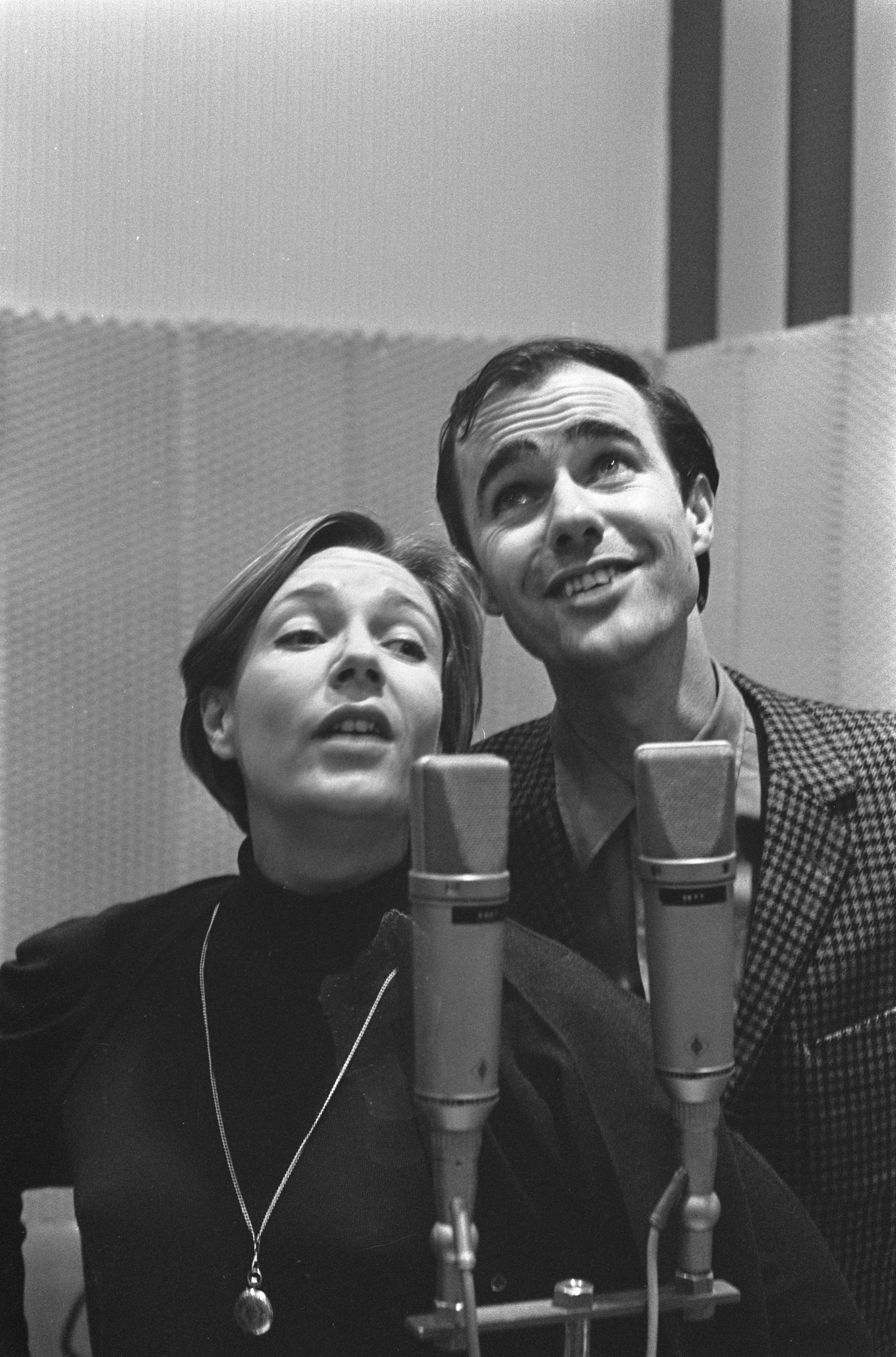 Musical "Ja, ik wil!" / "I do I do", Annet Nieuwenhuyzen en Eric Schneider bezig met grammofoonplaatopnamen.